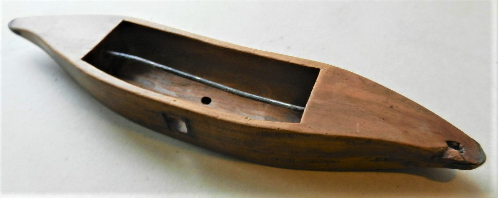 Weberschiffchen aus Holz fertigten die Spillmacher für die Webstühle